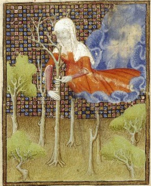 Isis tending trees